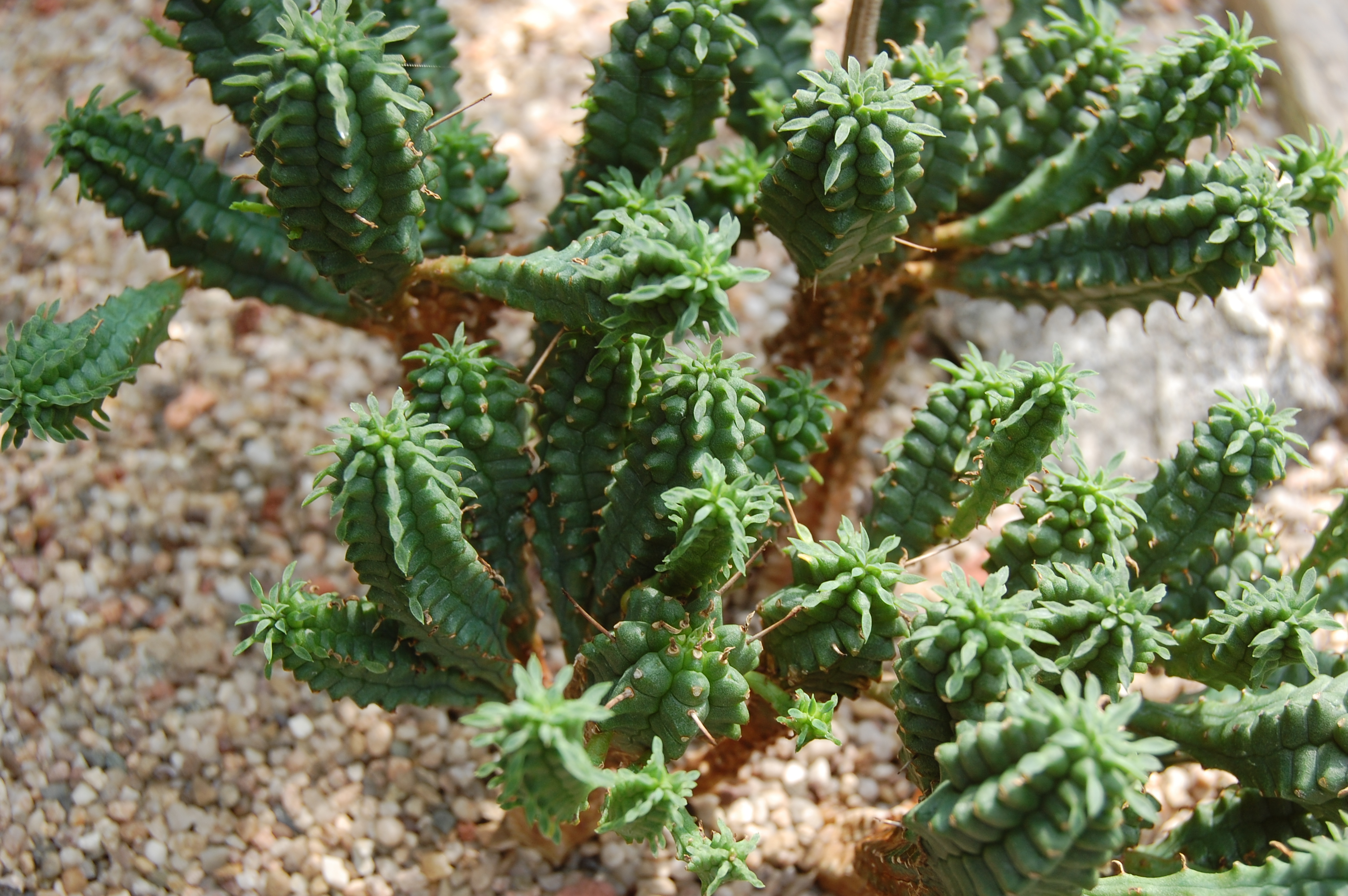 Euphorbia submammillaris